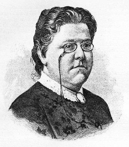 Минна Каутская, до 1893; nach einer Fotografie von Ludwig Angerer